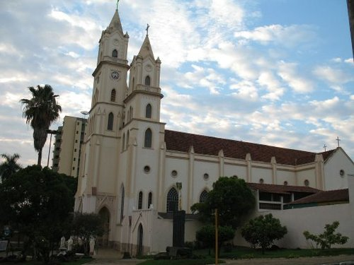 Catedral Santo Antonio Lins-SP